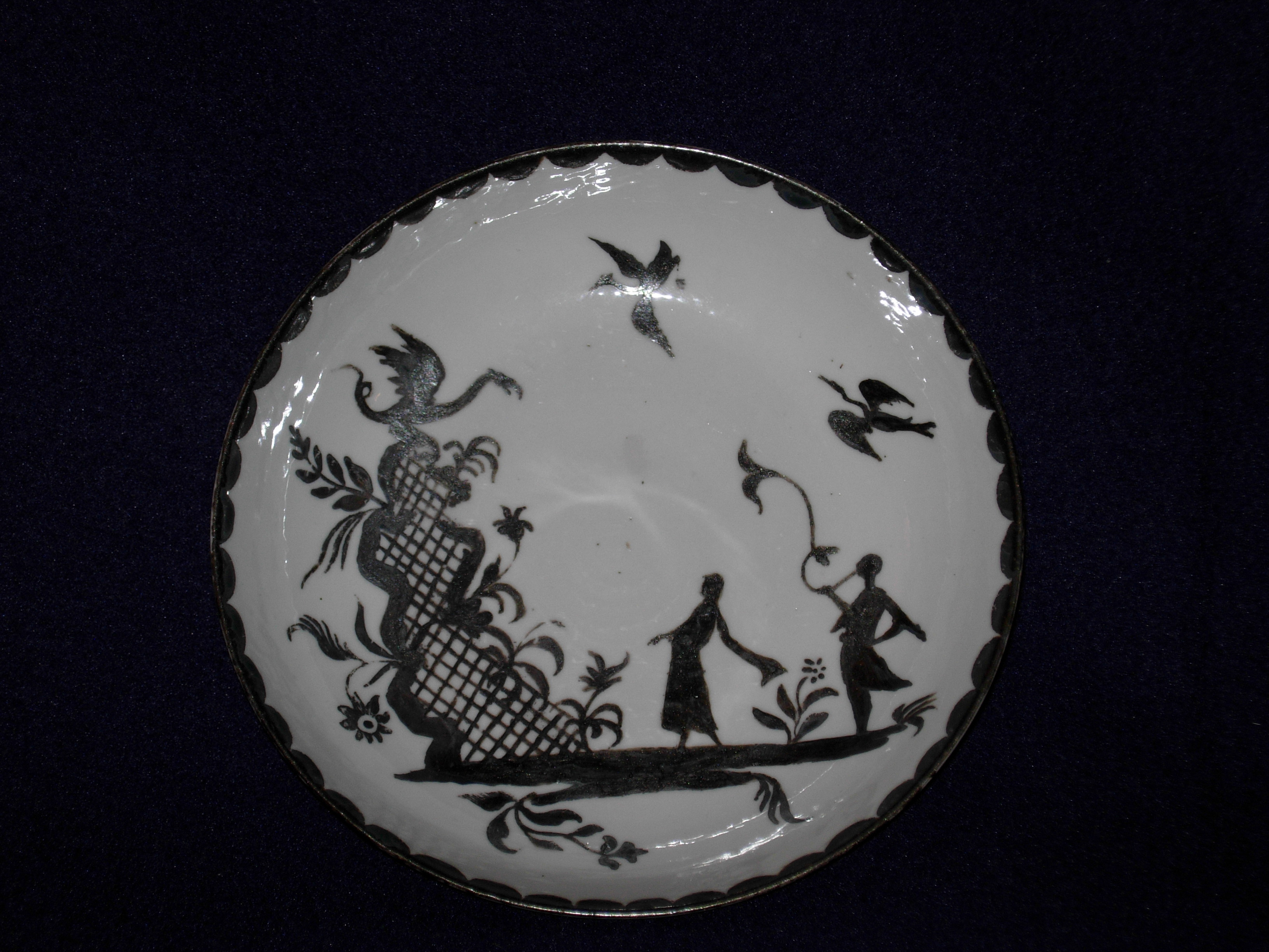 Piattino della manifattura Vezzi di Venezia pubblicato in "Rari inediti della fabbrica Vezzi" - pag. 61-64 - n° 2 Faenza - 2012